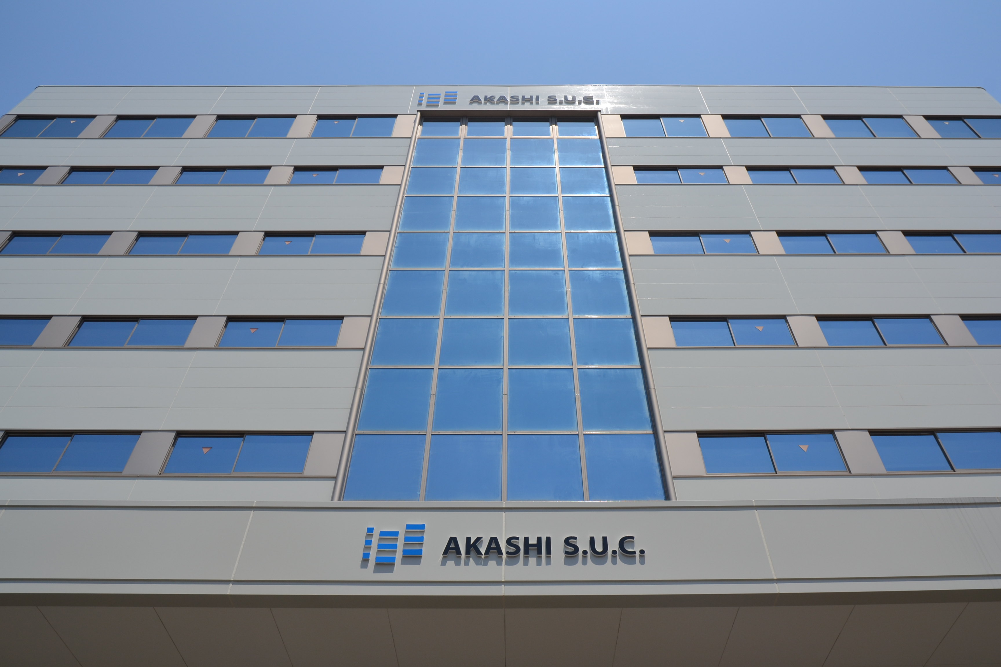 明石スクールユニフォームカンパニー 本社屋